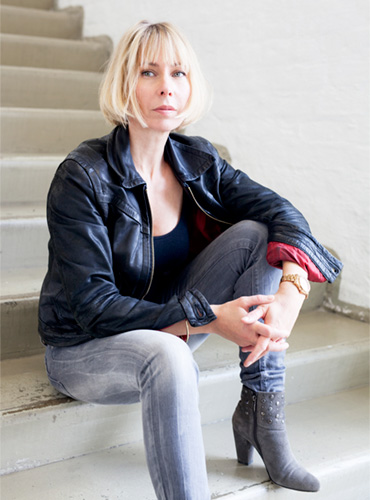 Annika Grof, käsikirjoittaja ja ohjaaja.